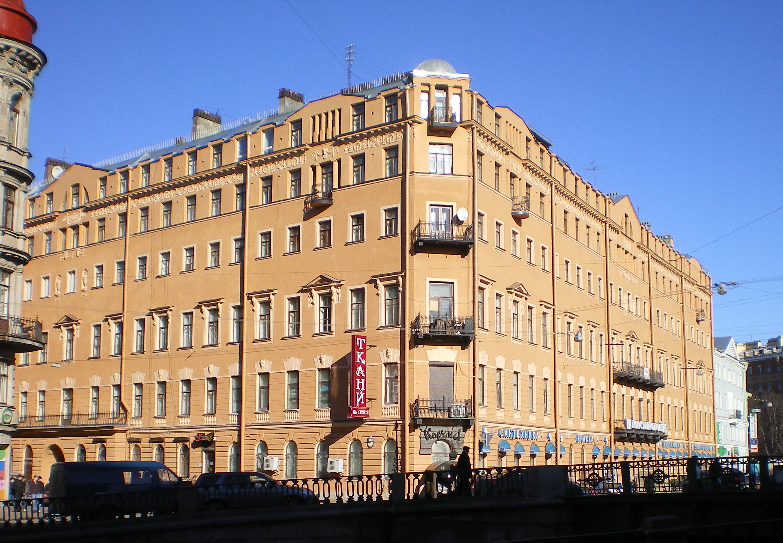 Канал Грибоедова, дома 69 и 67